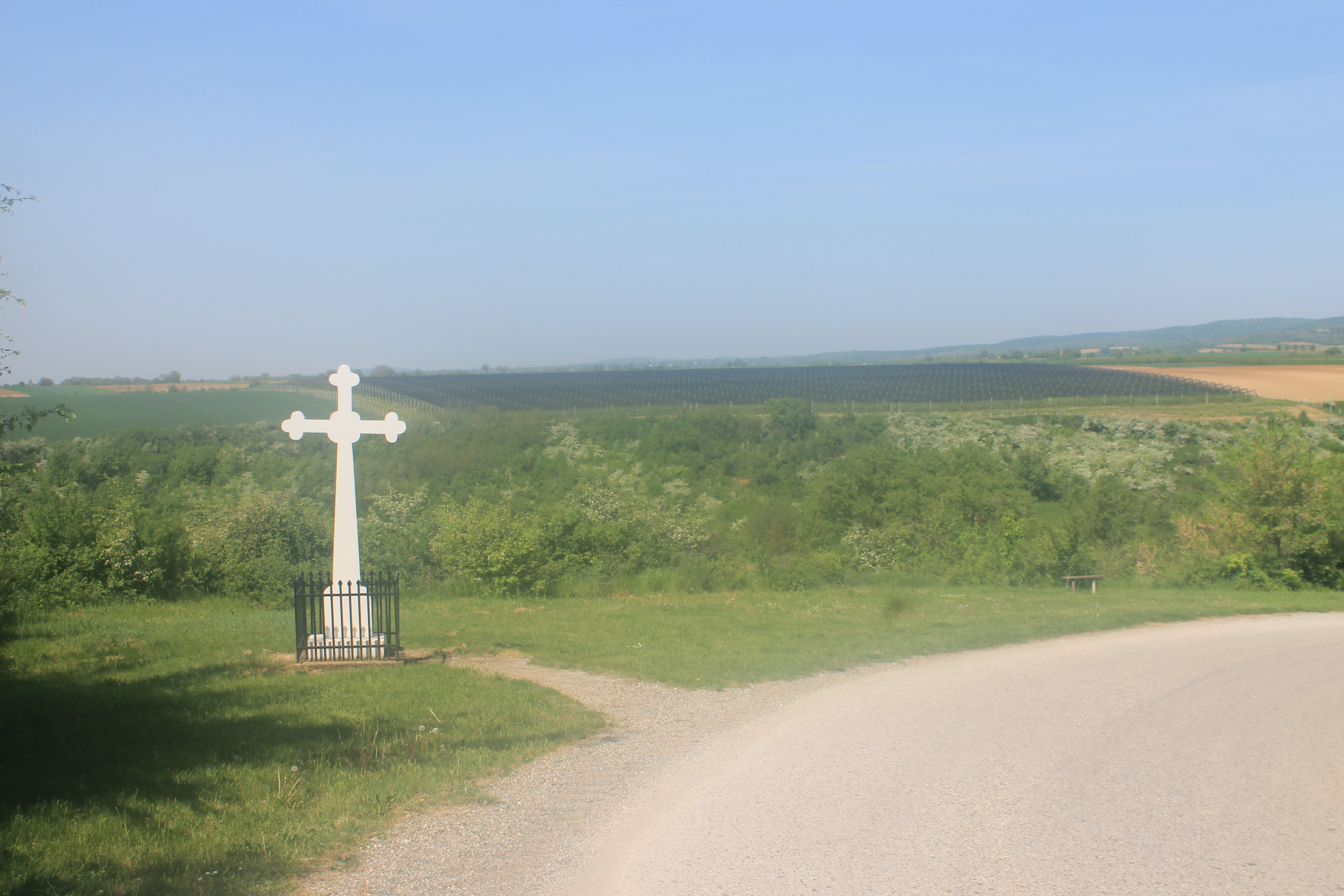 Zavetni krst